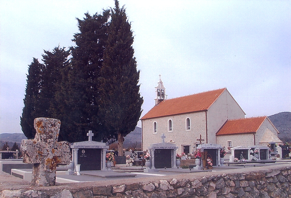 Crkva sv. Jure u Sitnom